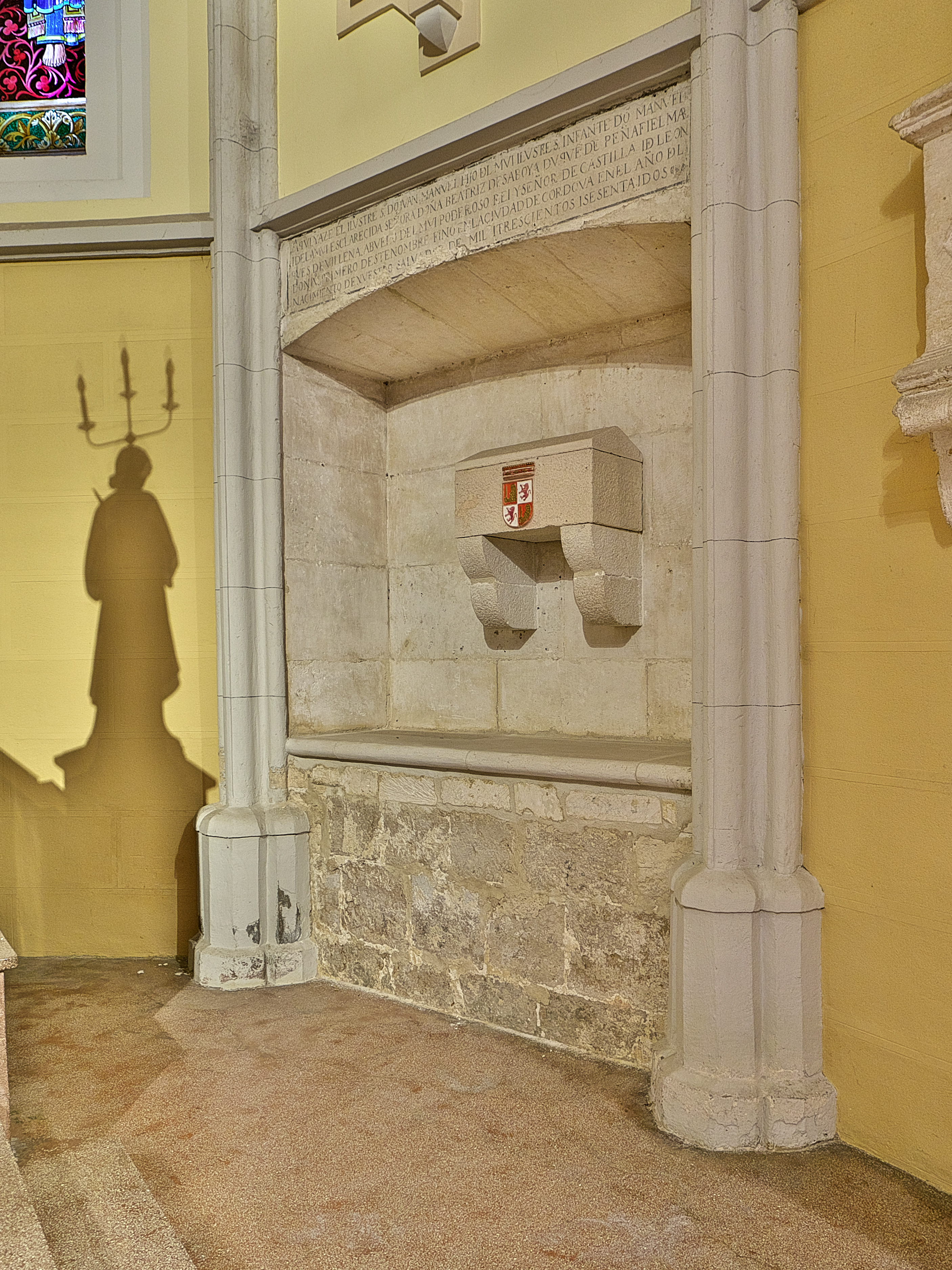 Capilla mayor del Convento de San Pablo (Peñafiel). A finales del siglo XVII, los restos mortales del don Juan Manuel (†1348) se trasladaron del centro del presbiterio a este nuevo lugar.